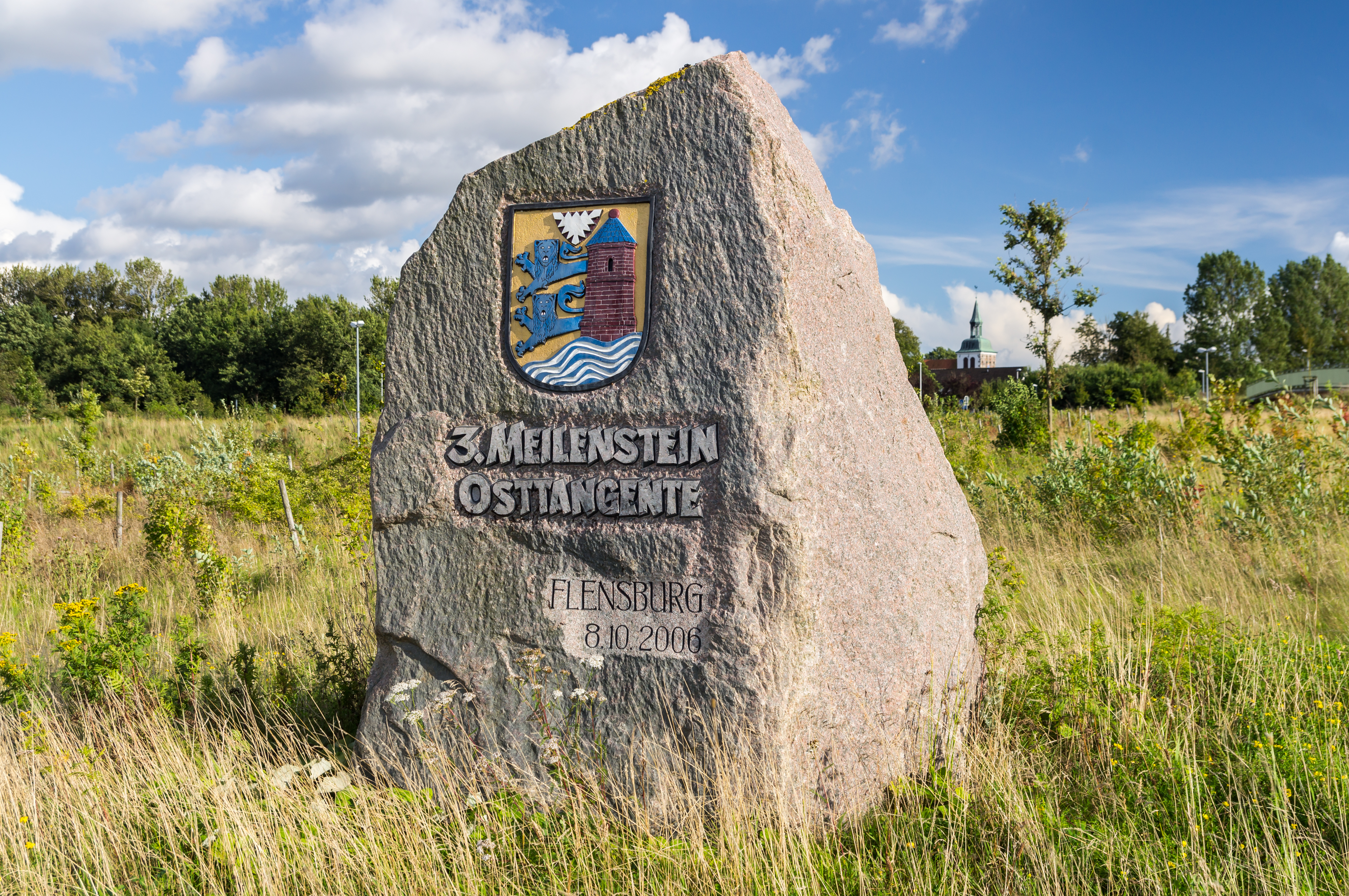 Der dritte von insgesamt drei Meilensteinen der Ostumgehung der Stadt Flensburg. An der Straße "Adelbyer Kirchenweg" gelegen. Aufgestellt 08.10.2006. Im Hintergrund die Kirche "St. Johannis zu Adelby".